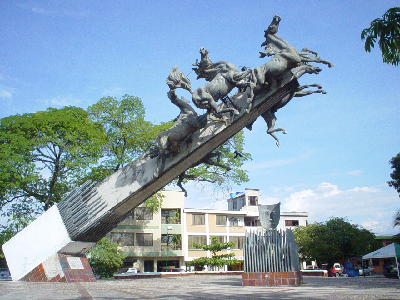 Los Potros, homenaje a José Eustasio Rivera de Rodrigo Arenas Betancur. Neiva, Colombia